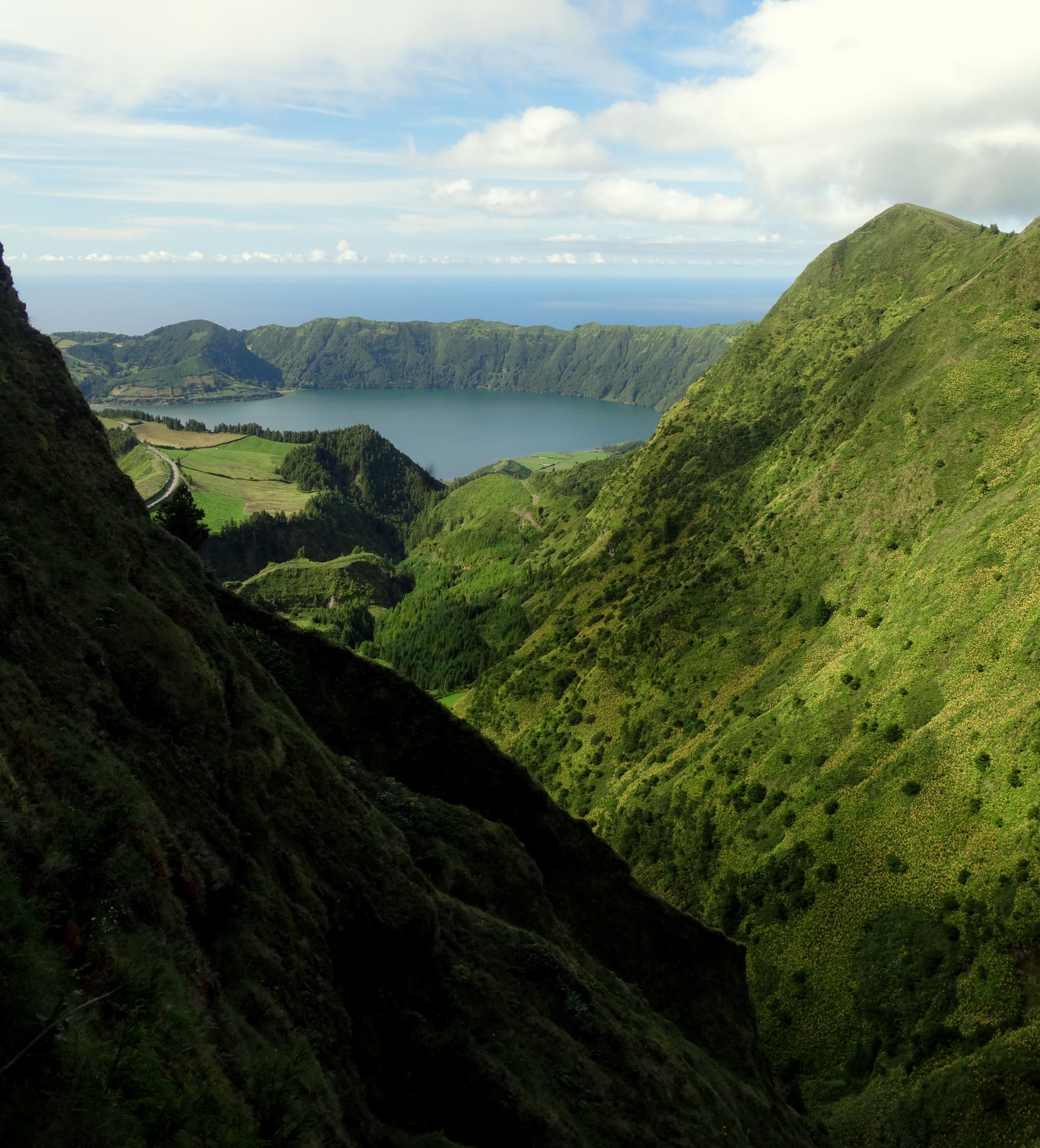 Lagoa das Sete Cidades